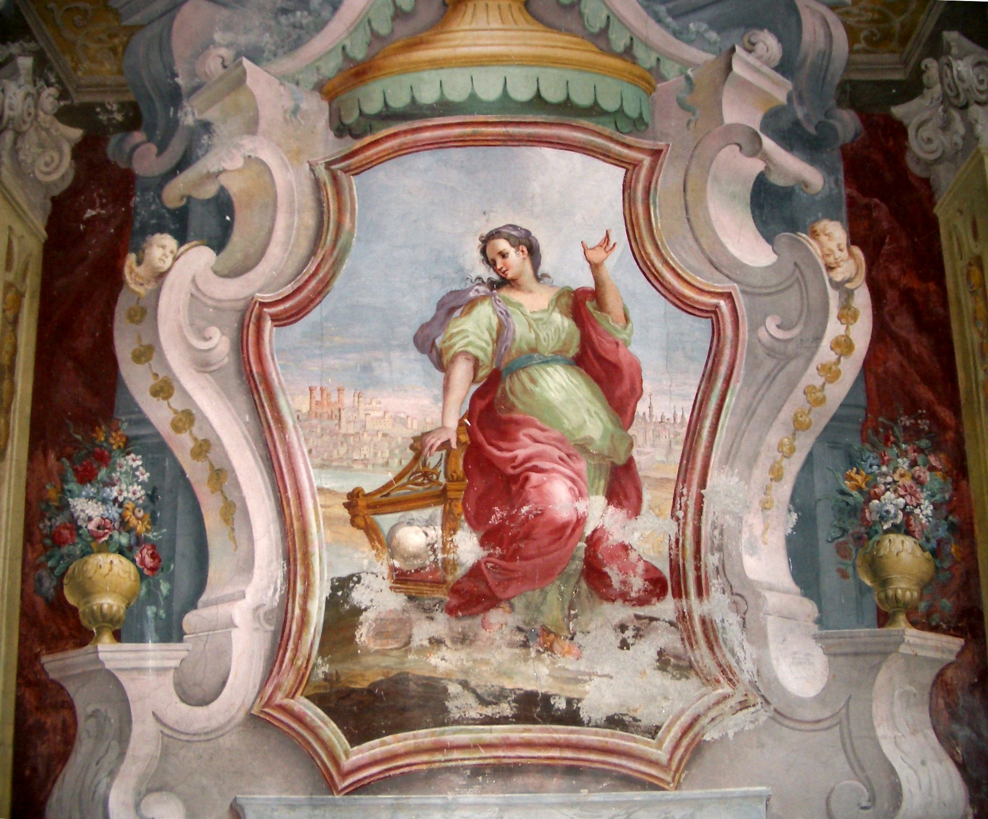 Luca Rossetti da Orta, Santa Giuliana da Ivrea, the educator of Saint Gaudenzio, fresco, ca. 1739, Saint Gaudenzio Church, Ivrea (Torino), Italy